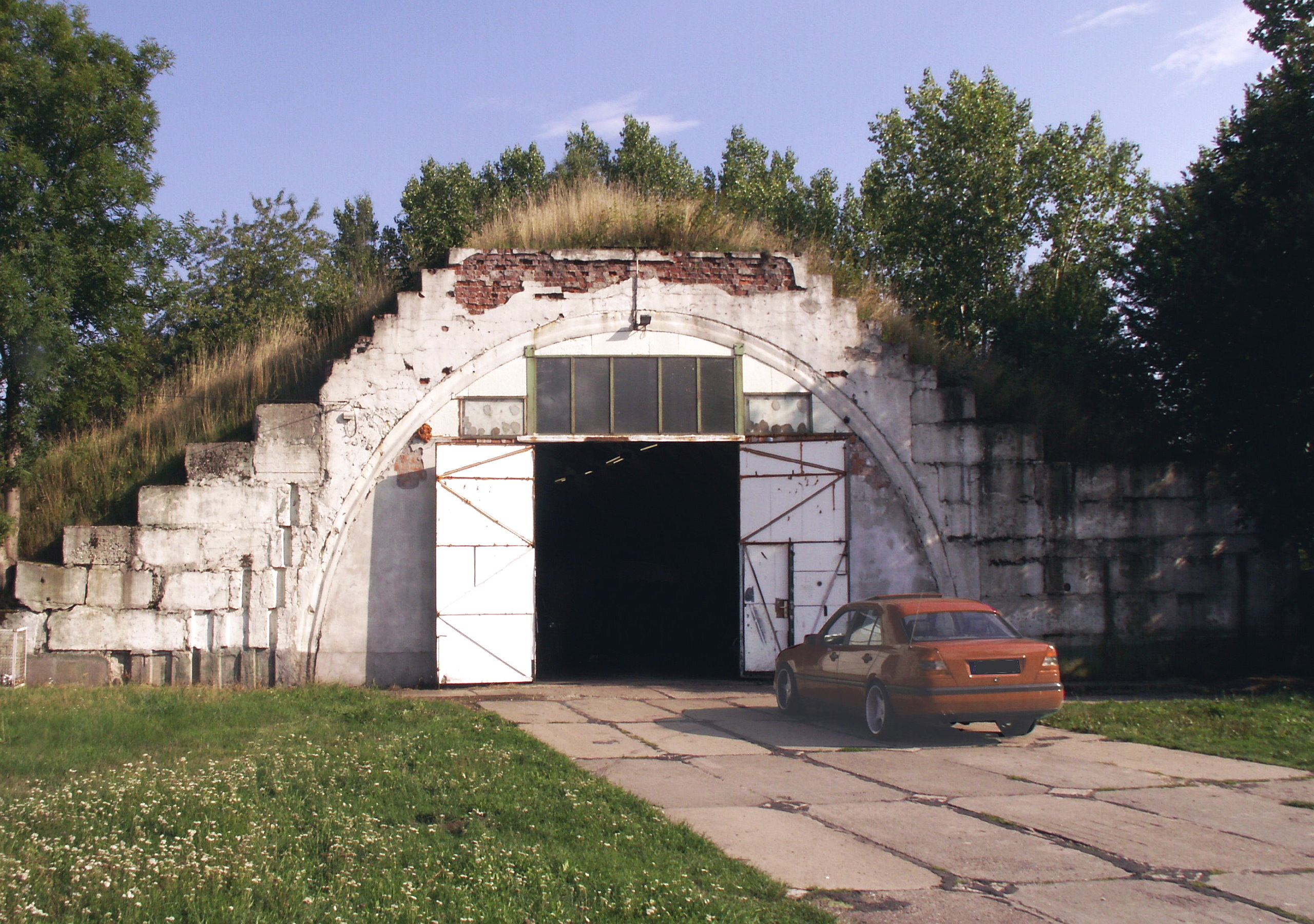 Überbleibsel der früheren militär. Nutzung am heutigen Flugplatz Altenburg-Nobitz: Flugzeug-Schutz-Bunker gebaut in 1968/69 für MIG 21 40 Stück Bogendeckungen AU-11 - Foto Wolfgang Pehlemann PICT0350